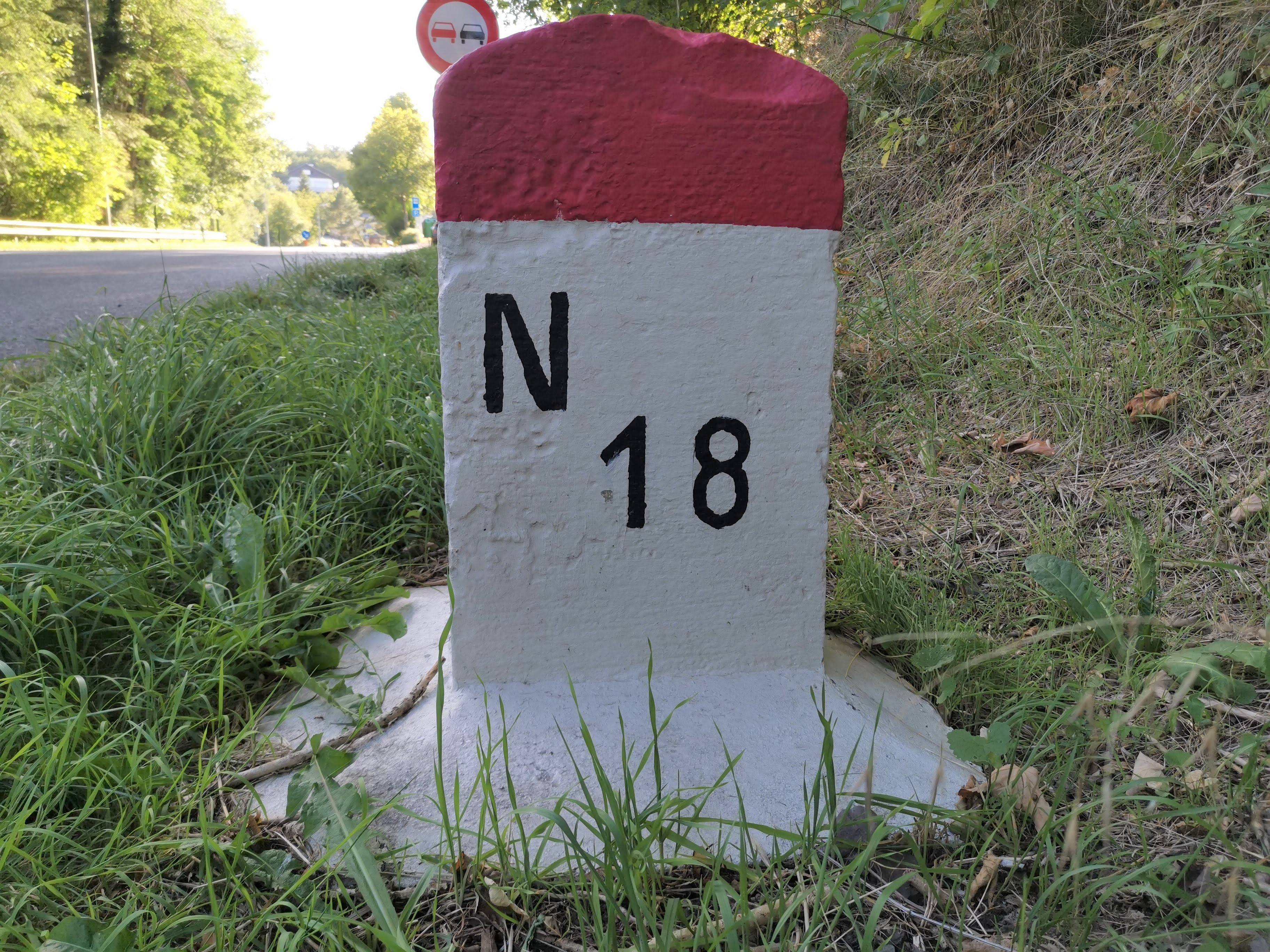 Borne kilométrique N18 à Reuler.